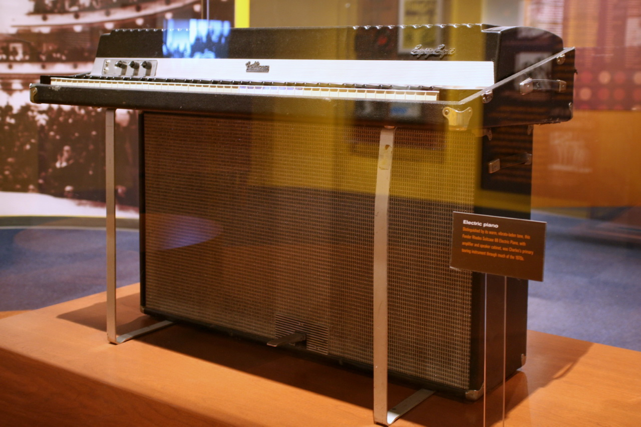 Fender Rhodes Suitcase 88 electric piano